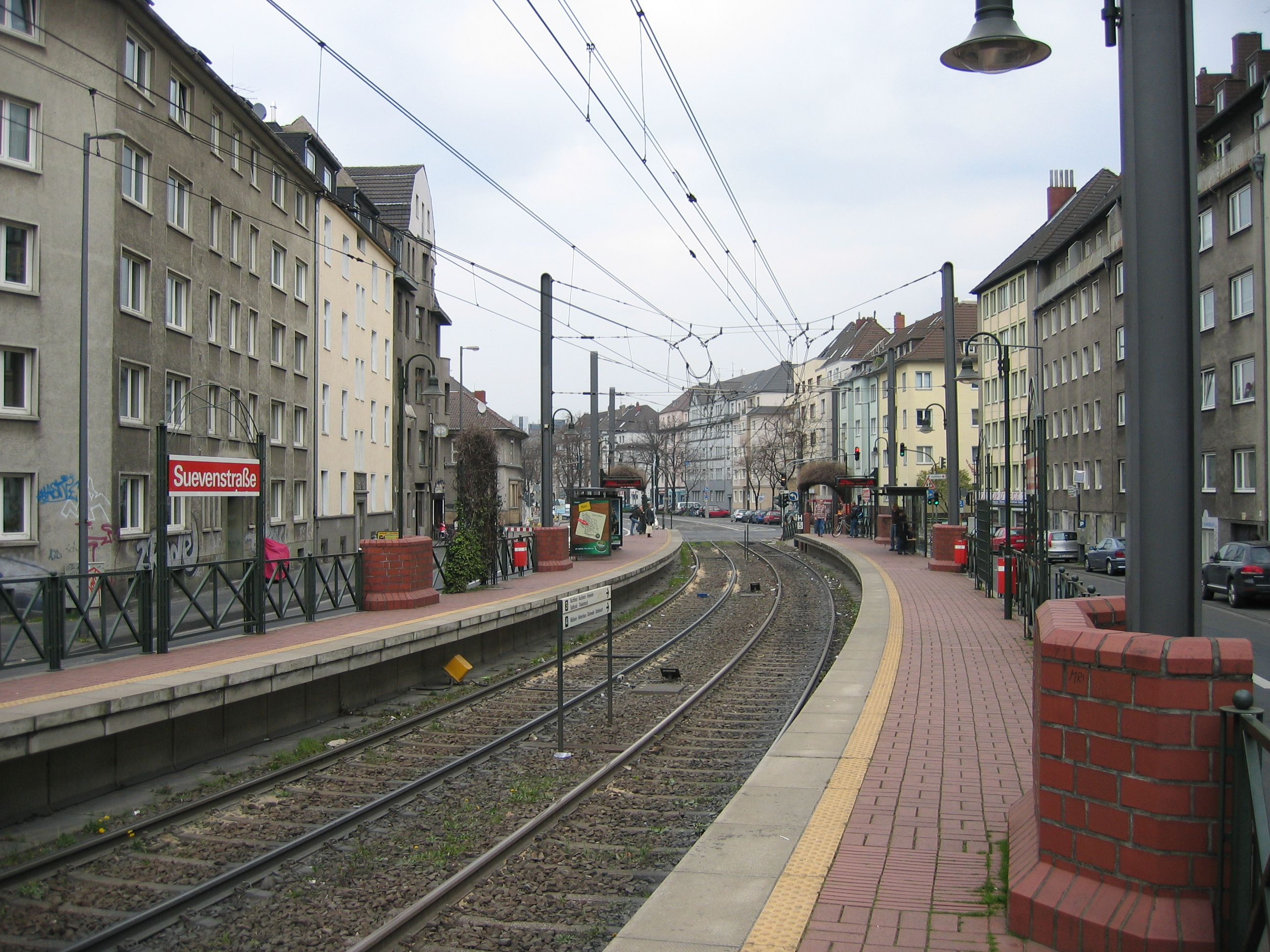 Stadtbahn Köln, Station Suevenstraße